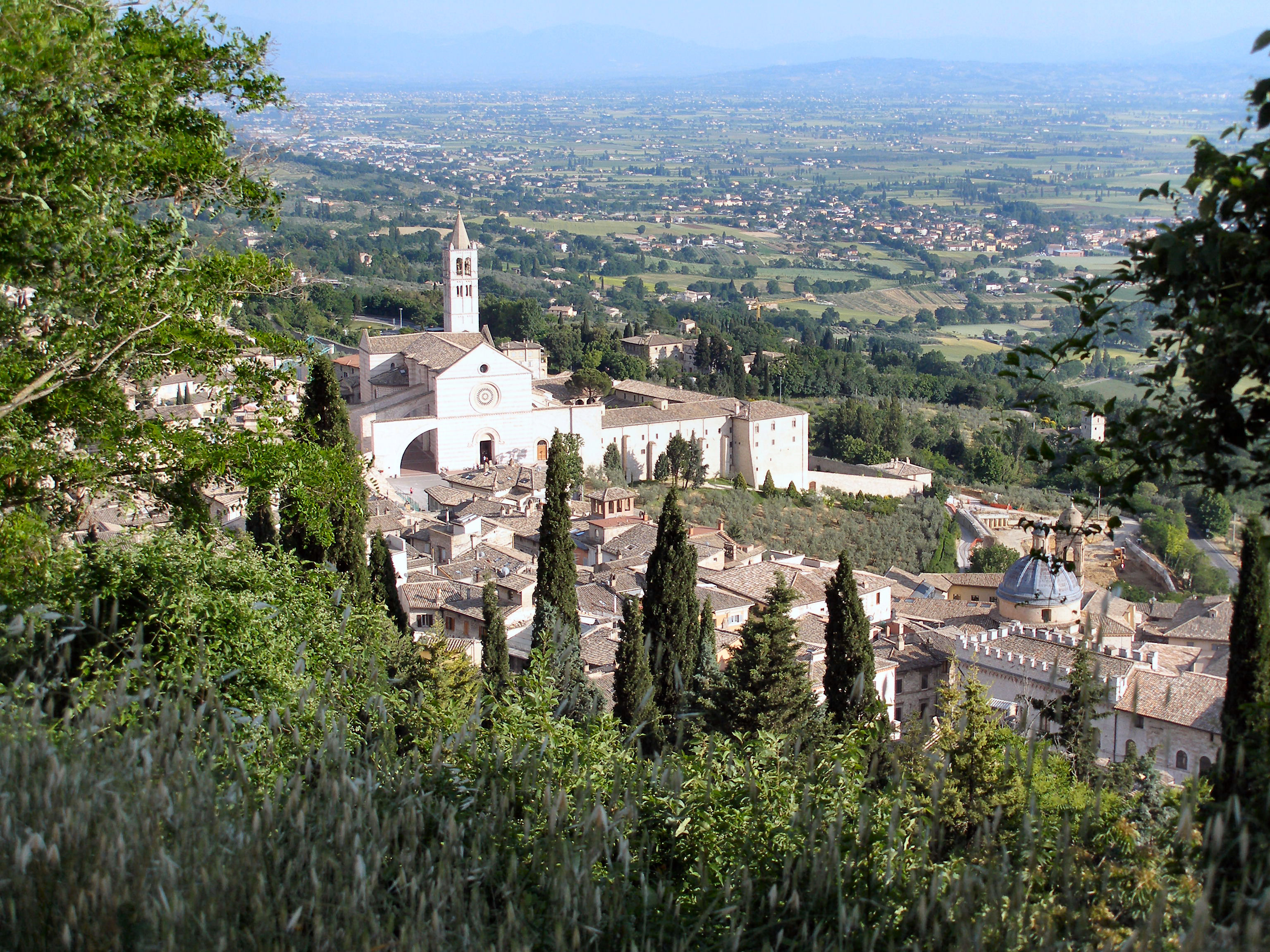 Assisi, Basilica di Santa Chiara